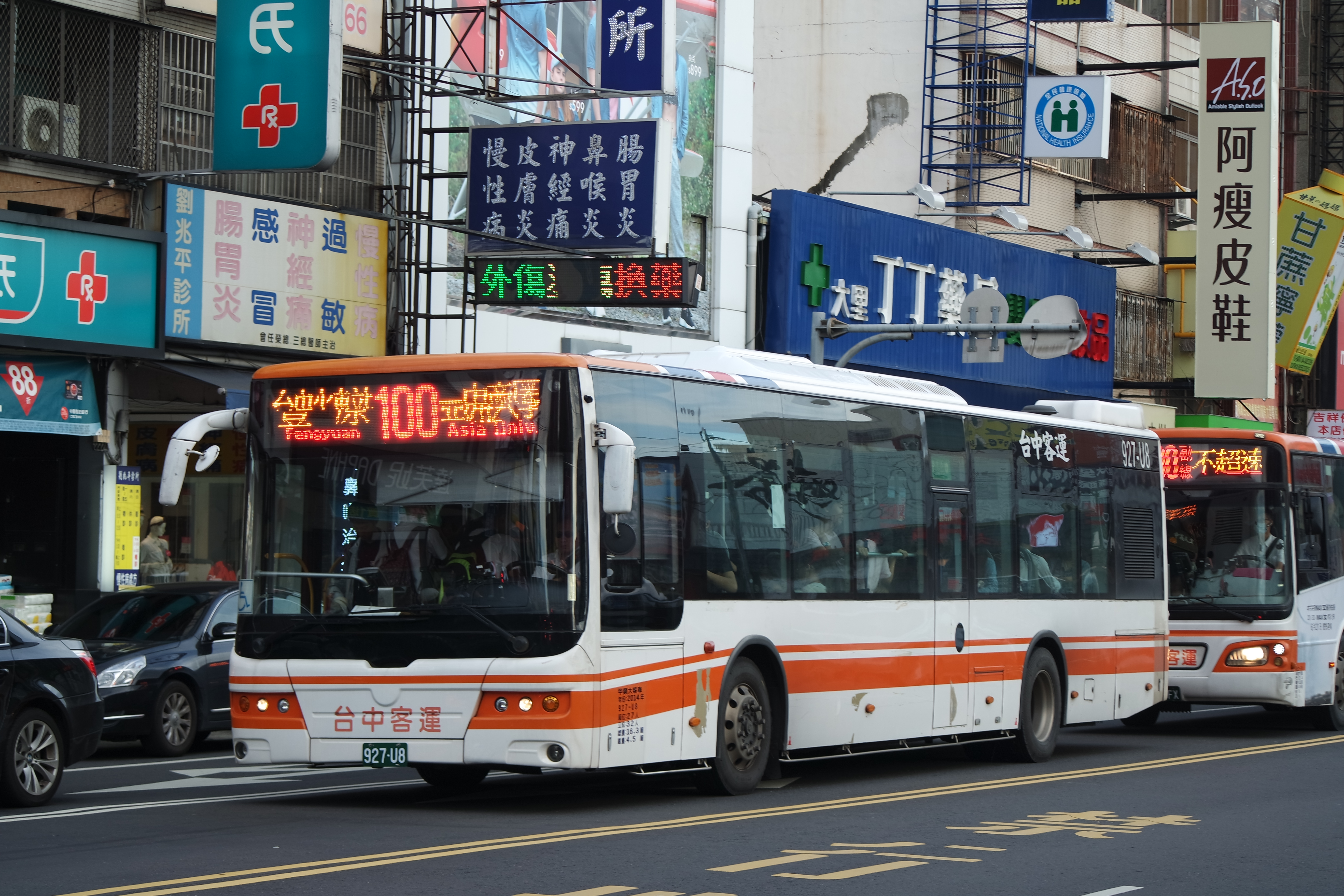 台中客運金旅XML6125三門低地板公車927-U8。